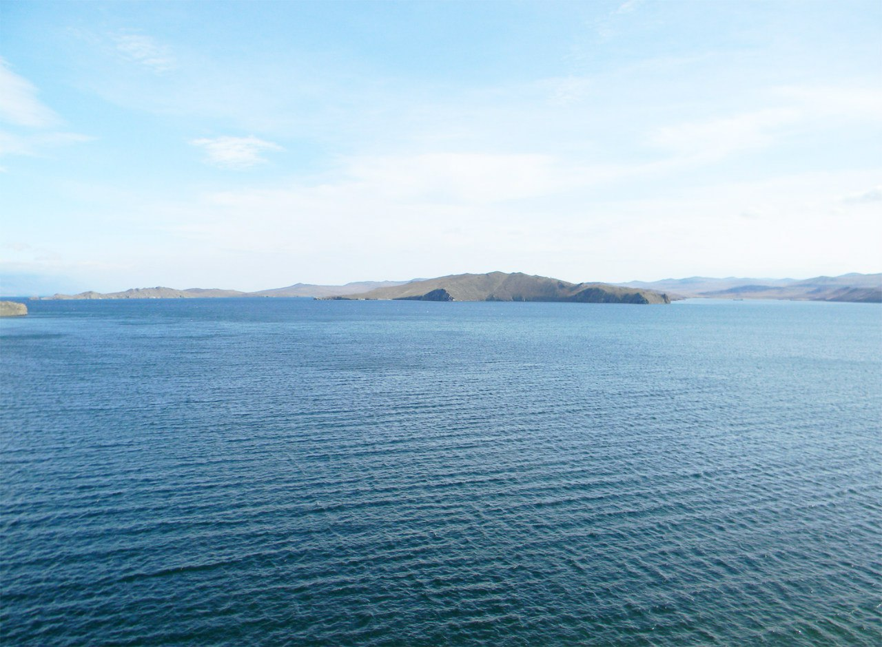 Вид на пролив «Ольхонские ворота» со стороны Байкала.